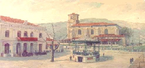 Kuadroan Deustuko plaza ikusten da, kioskoa, eliza eta udala